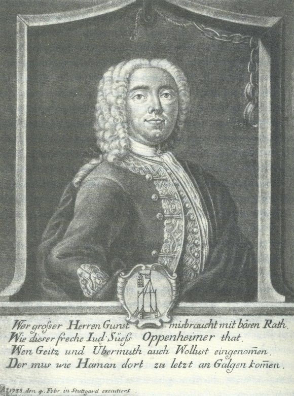 "Wer großer Herren Gunst missbraucht" (after 1738); Posthumer Kupferstich Joseph Süß Oppenheimers; WLB, Graphische Sammlung